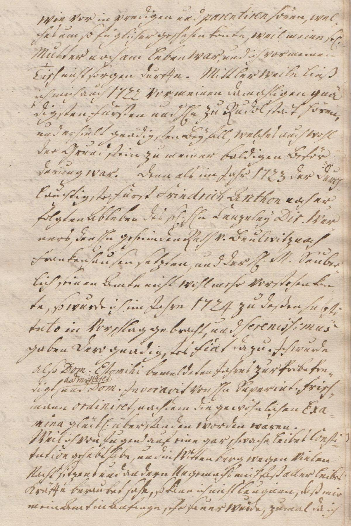 Seite 7 der Leichenpredigt für den Pastor August Wilhelm Reinhart (1696/1770), Bürger der Stadt Heringen an der Helme.